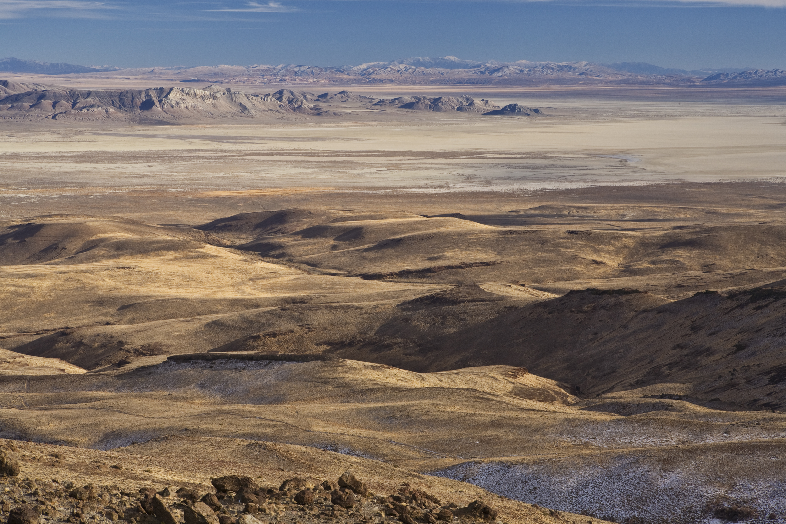 Black Rock, Nevada, USA